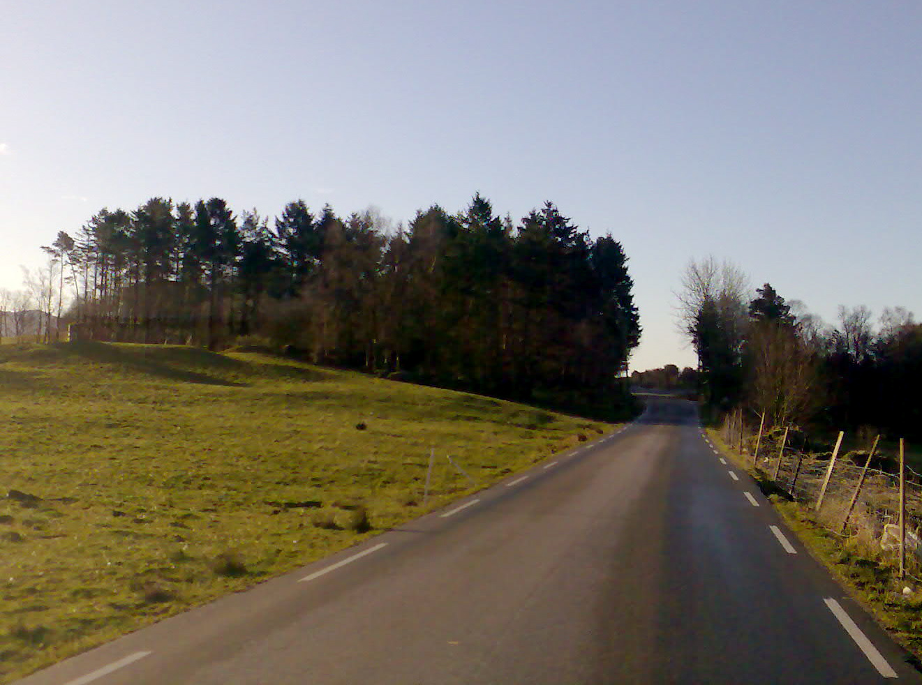 Å kjøre til fjellet en tidlig påskemorgen.